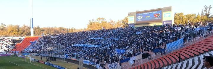 Final de Campeonato de 1° División de Fútbol de Argentina 2012/2013; Vélez Sarsfield derrota 1-0 a Newells y se consagra campeón de la temporada. Gol de Lucas Pratto a los 8 minutos de juego. Visión panorámica de los más de 15.000 hinchas Fortineros.